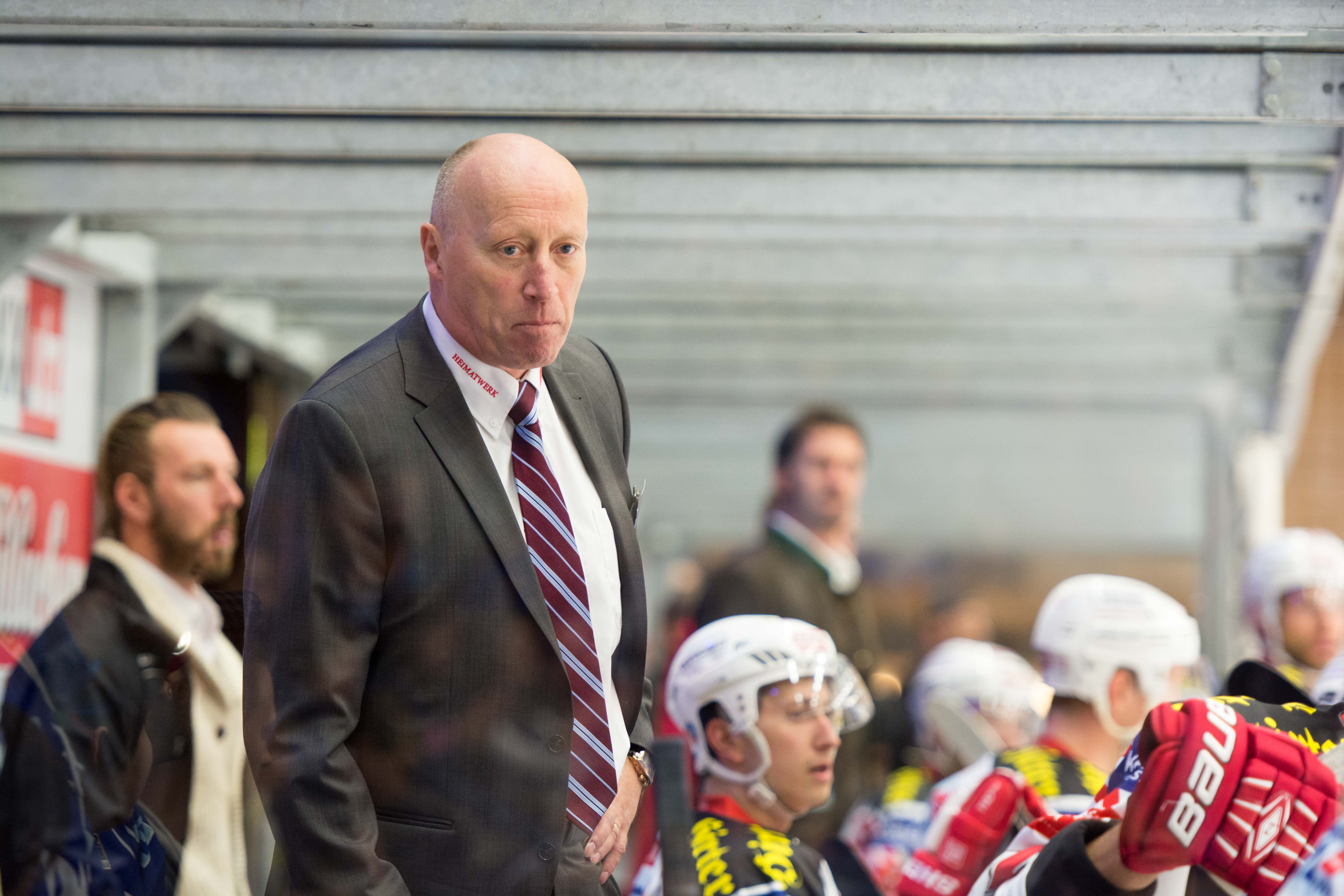 12.10.2014, Stadthalle Villach, AUT,EBEL,EC VSV vs. EC KAC im Bild Doug Mason, (EC KAC,Headcoach)